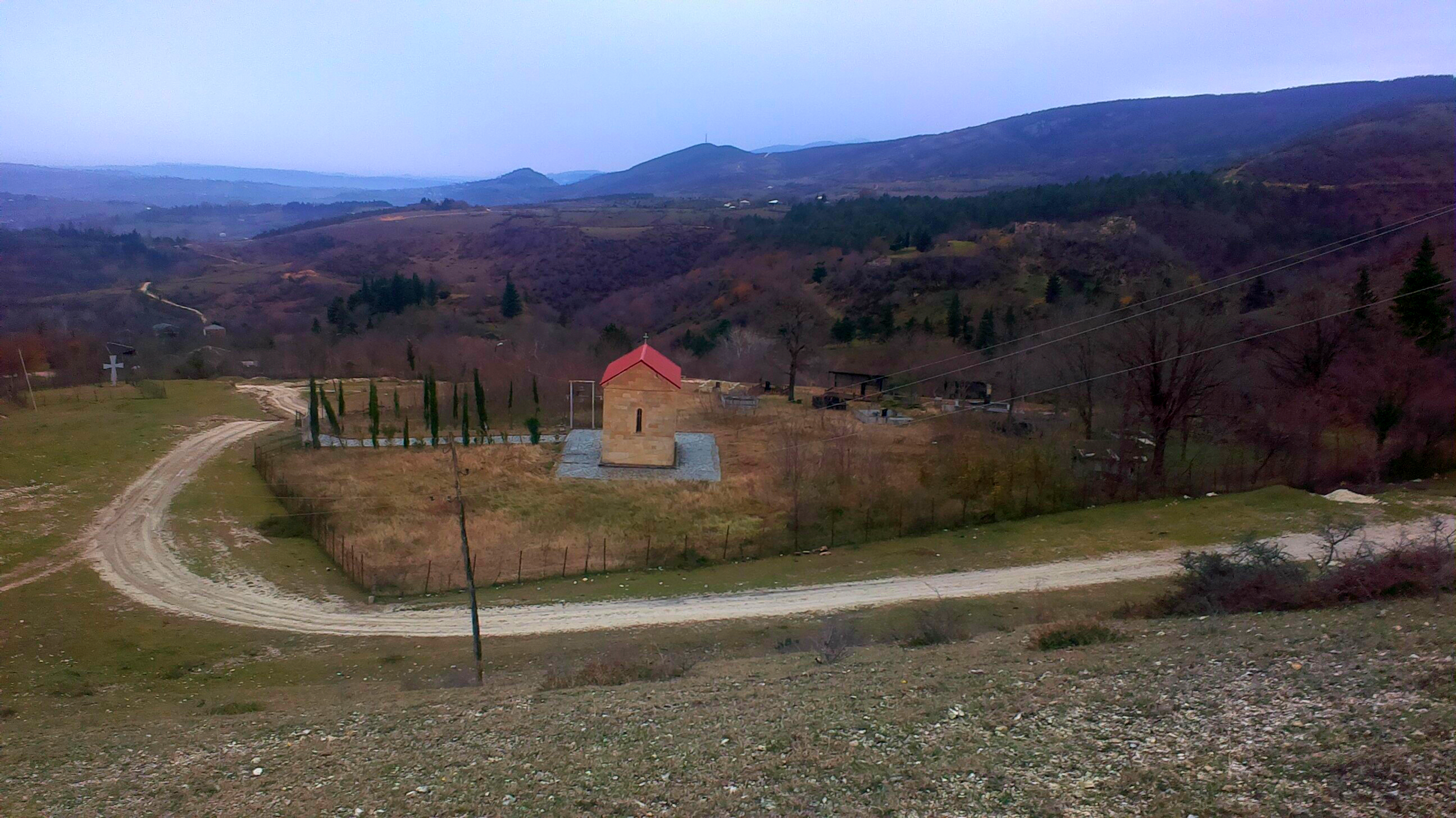 church